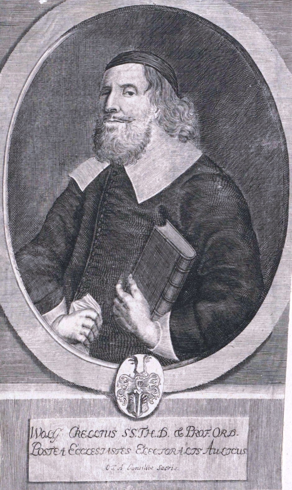 Wolfgang Crell (1592–1664)